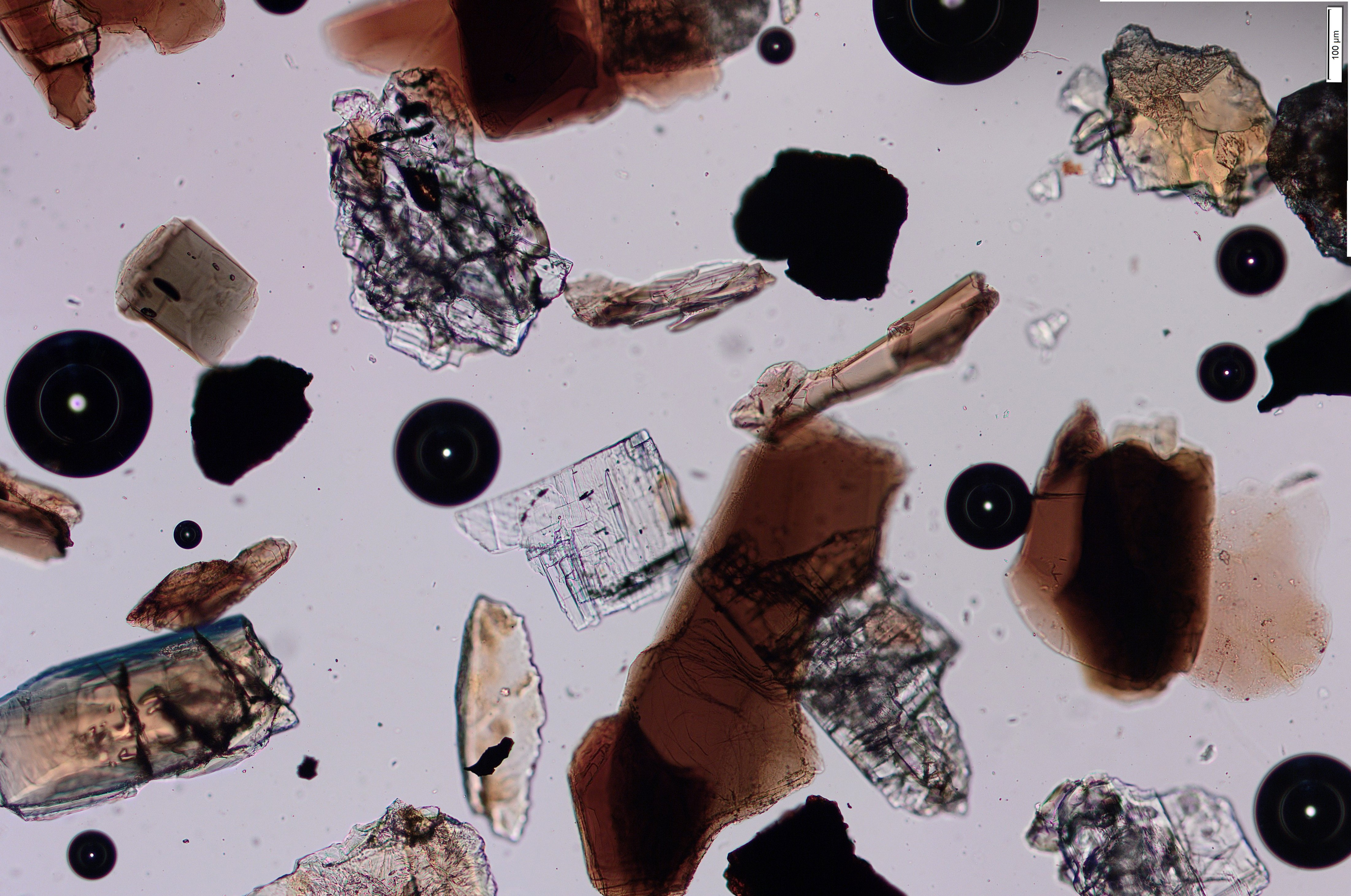 Schwermineralprobe mit Staurolit, Kyanit, Turmalin und reichlich Biotit aus rezentem Sand eines Flusses in den Schweizer Alpen (Ticinetto)